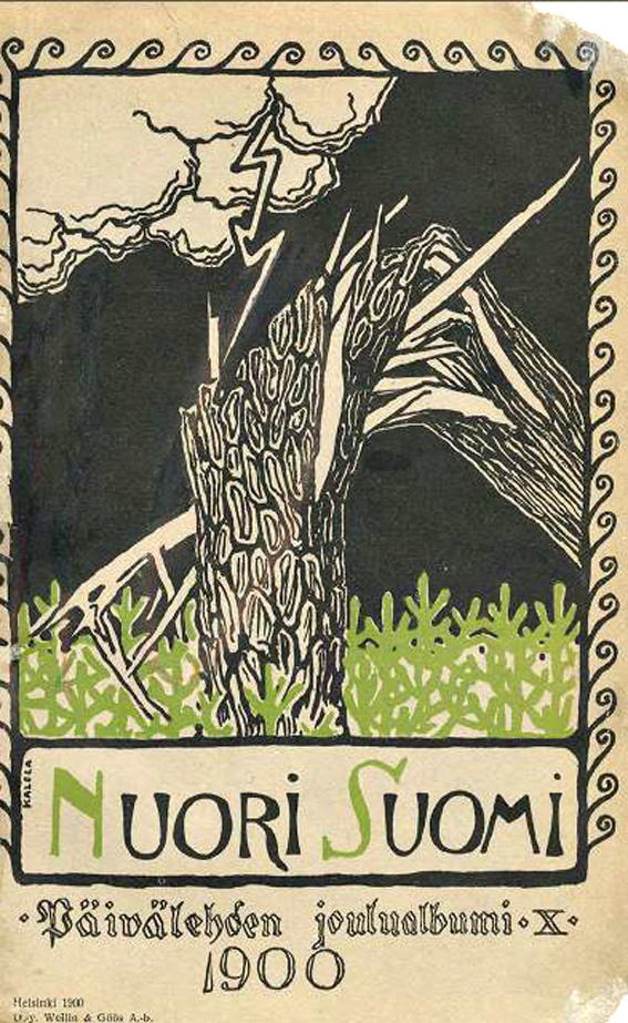 Nuoren Suomen kansilehden vuodelta 1900 suunnitteli Akseli Gallen-Kallela.